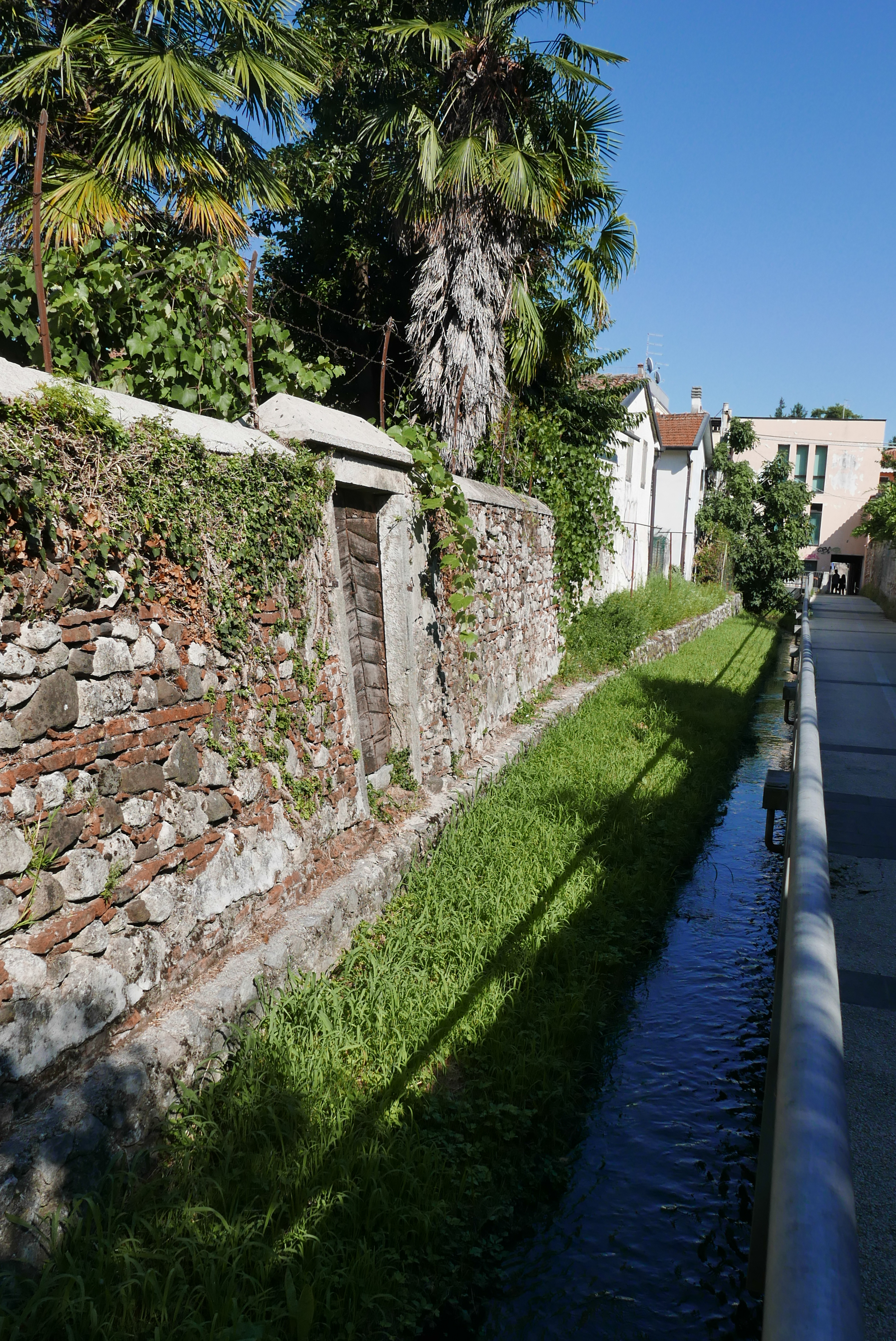 Thiene Rogge